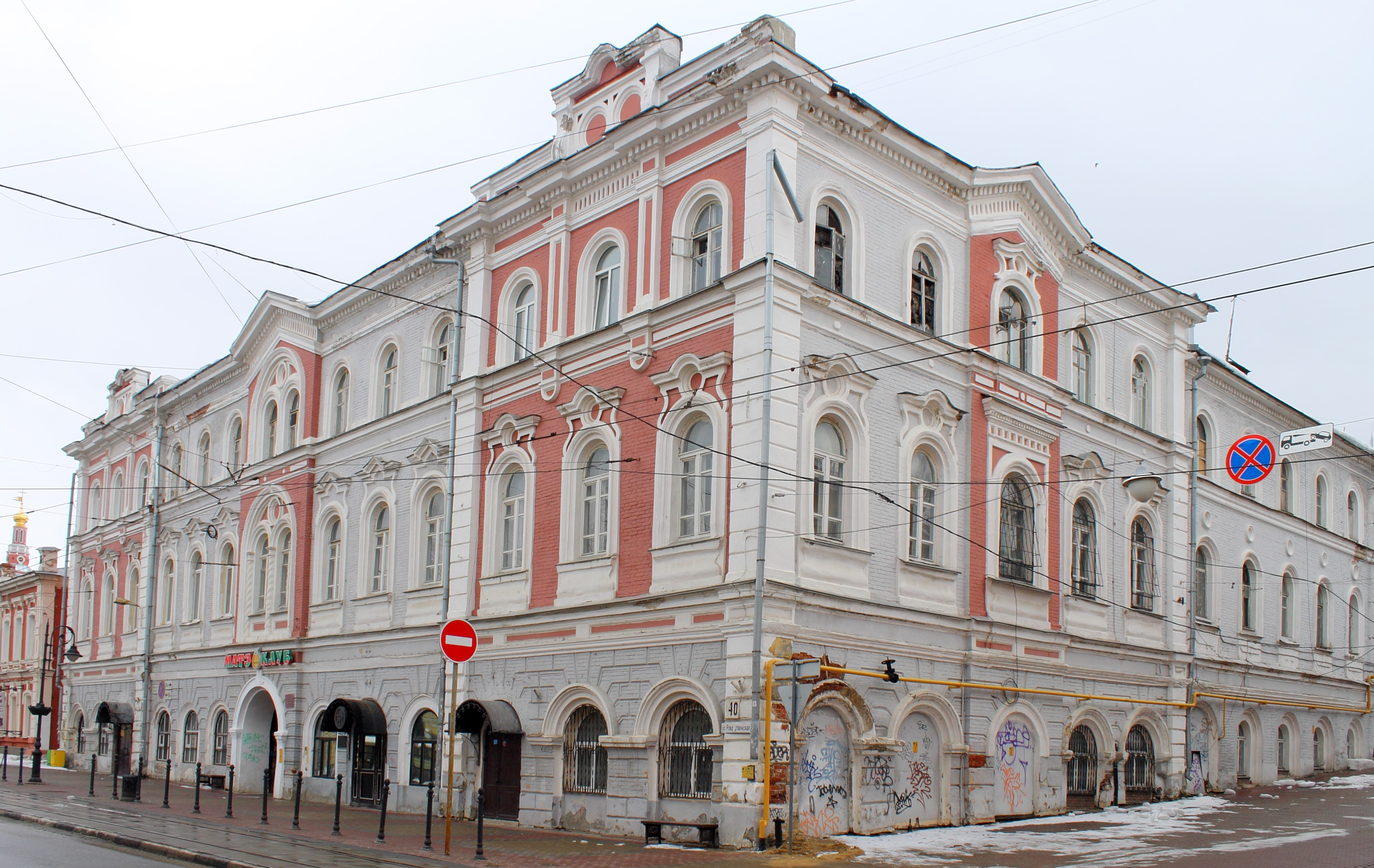 Здание гостиницы: улица Рождественская, 40, Нижний Новгород, Нижегородская область